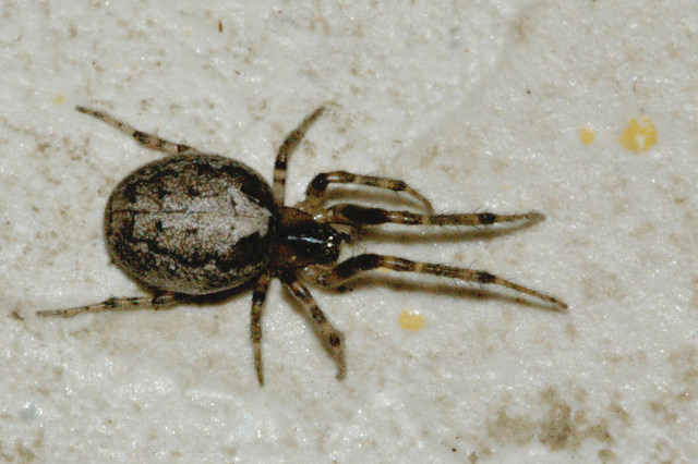 female Zygiella x-notata from Commanster, Belgian High Ardennes .